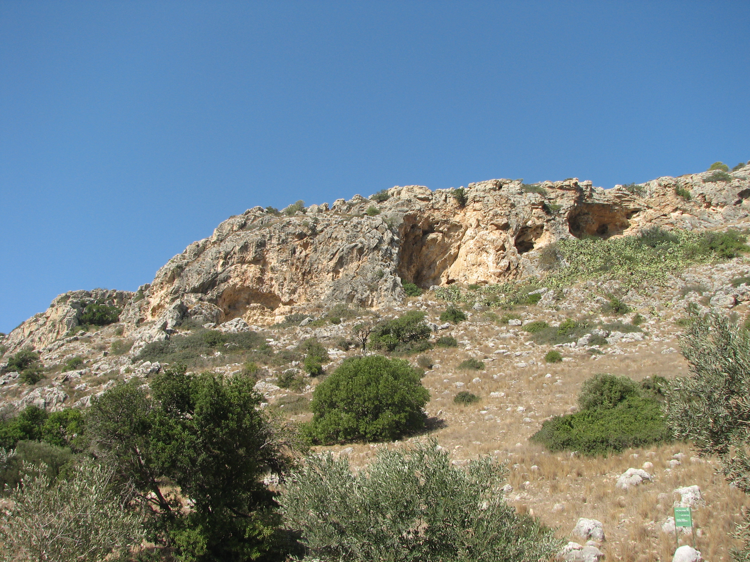 Oren Wadi - Mount Carmel Israel נחל אורן זורם בהר הכרמל מערות על מצוק נחל אורן